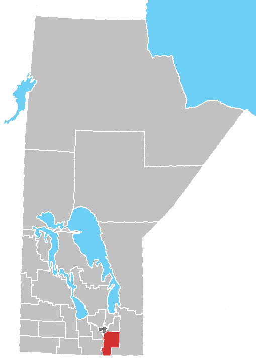 Manitoba census area No. 2